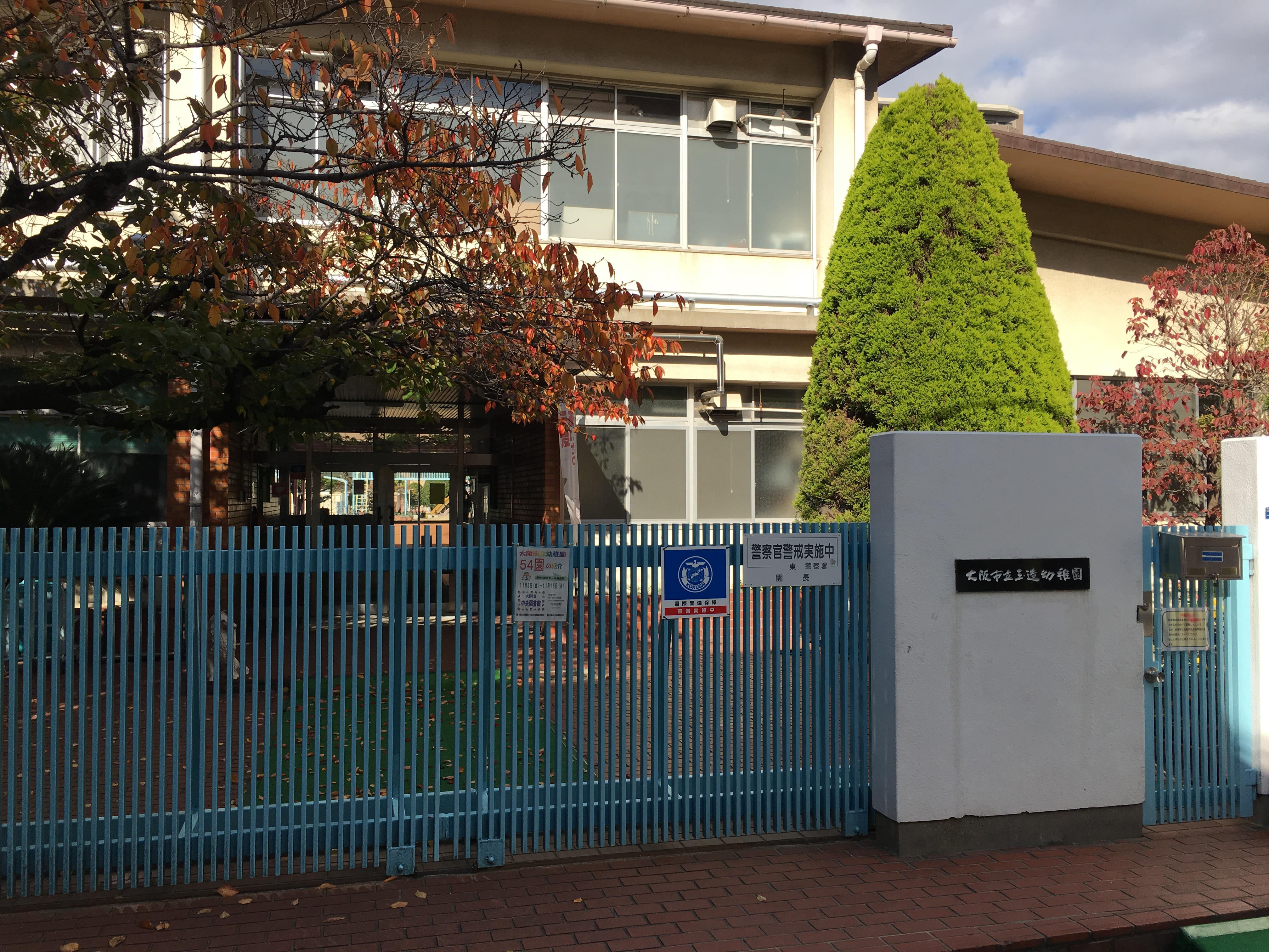 大阪市立玉造幼稚園